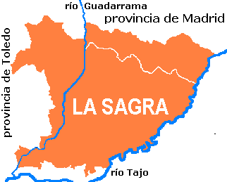 croquis de la comarca natural de La Sagra (Madrid-Toledo) España